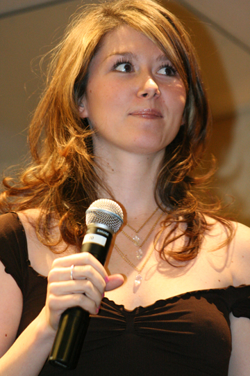 Jewel Staite